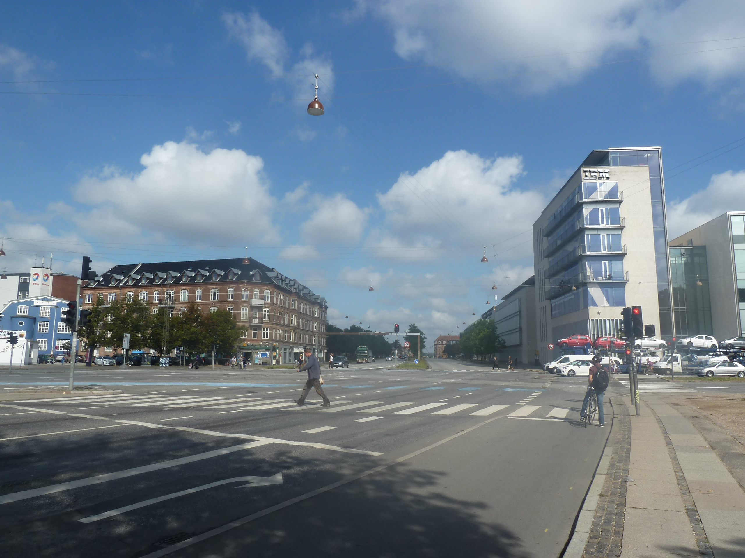 The square Vibenshus Runddel in Østerbro in Copenhagen.